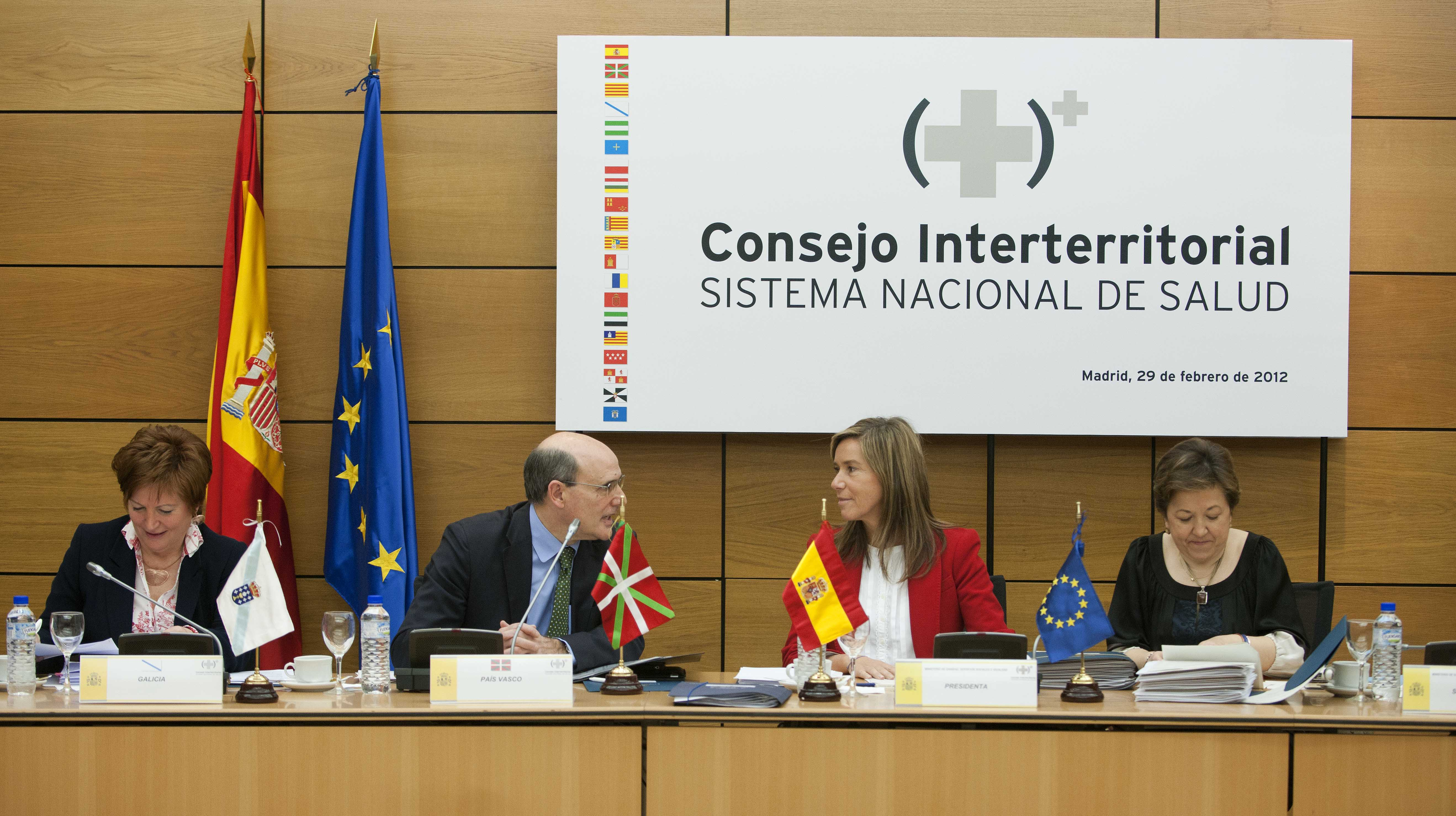 Bengoa asiste al Consejo Interterritorial de Salud (5)